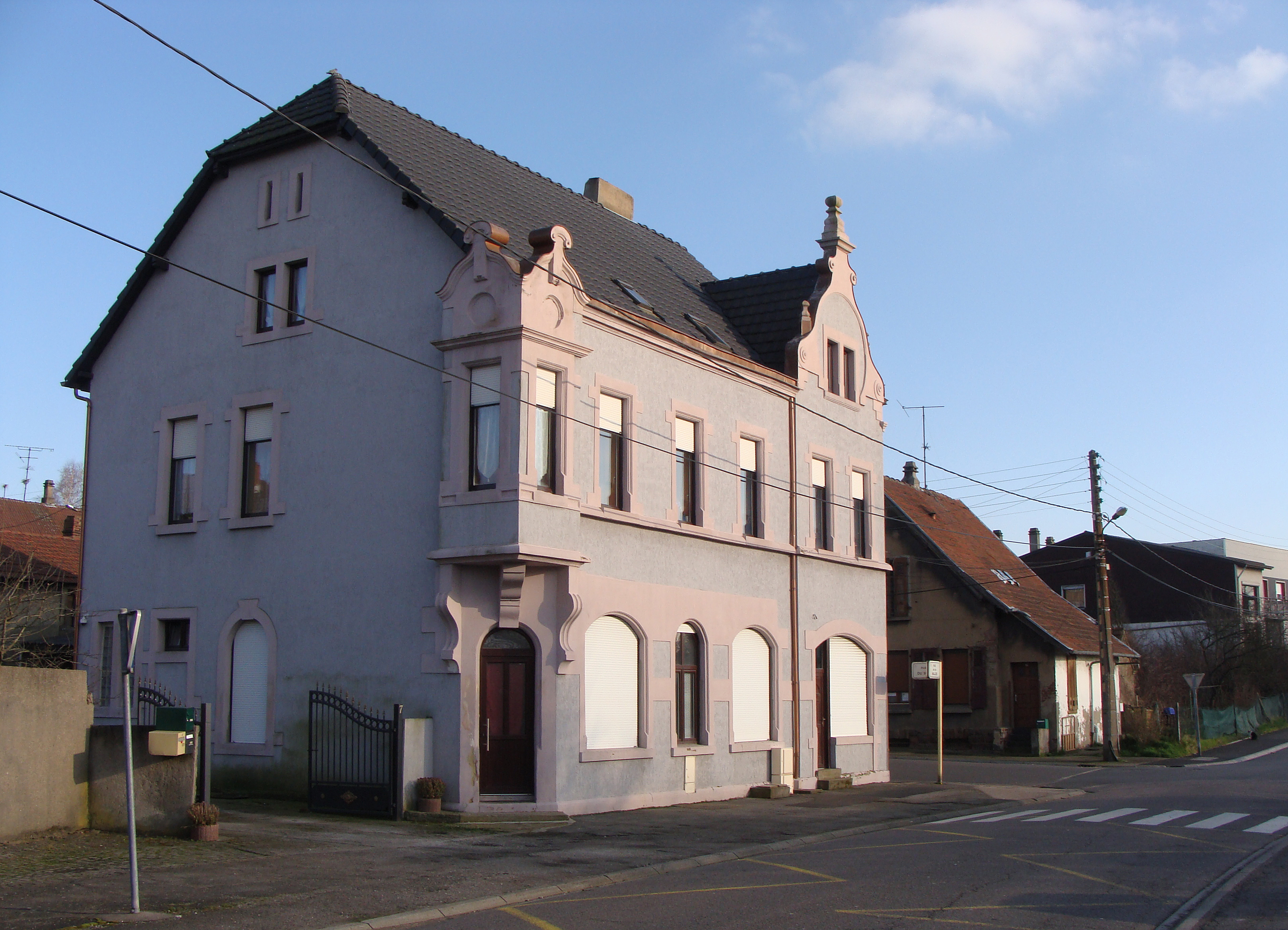 Cité Bois-Richard de L'Hôpital (Moselle), rue de la Vallée.